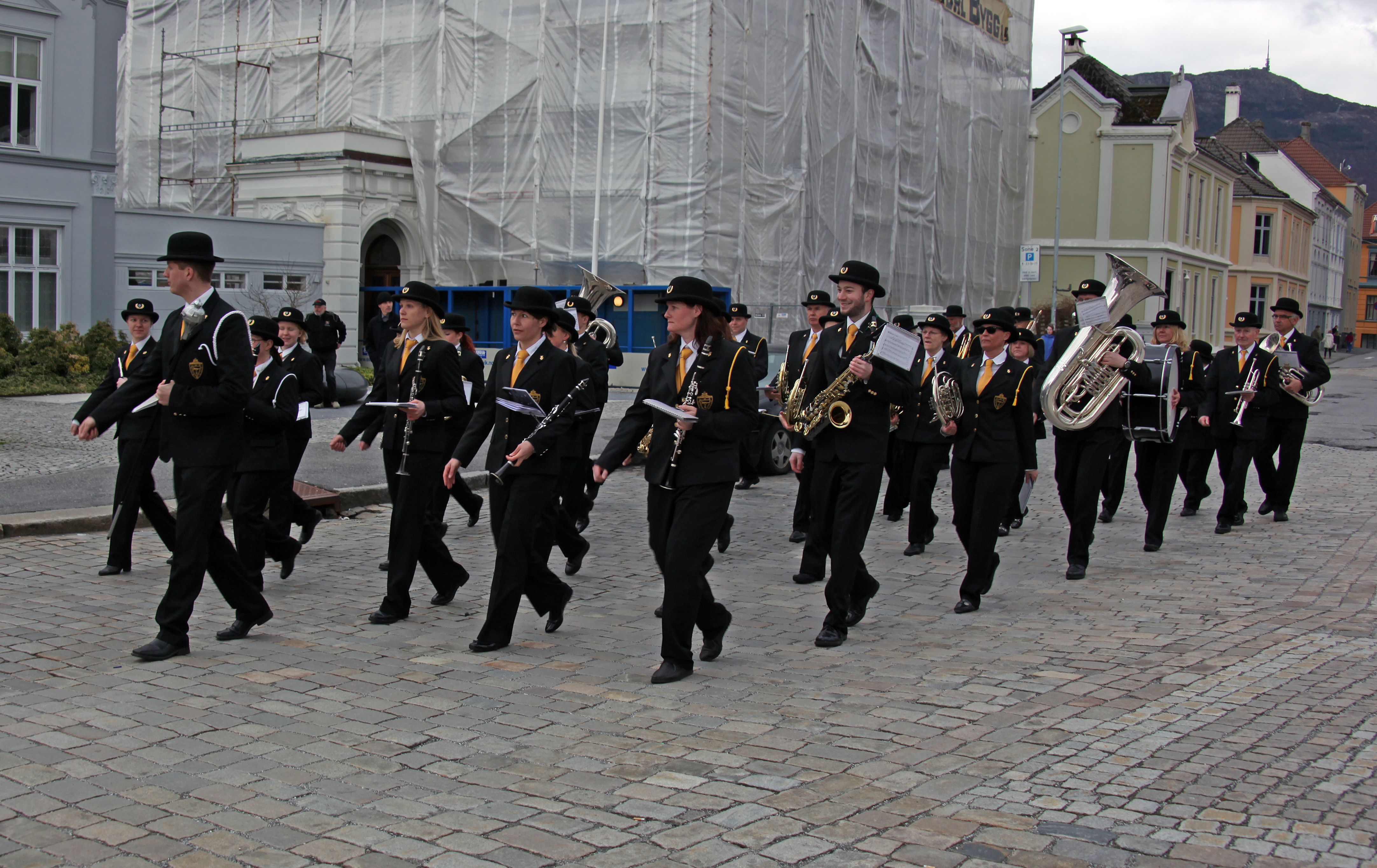 Lungegaardens Musikkorps